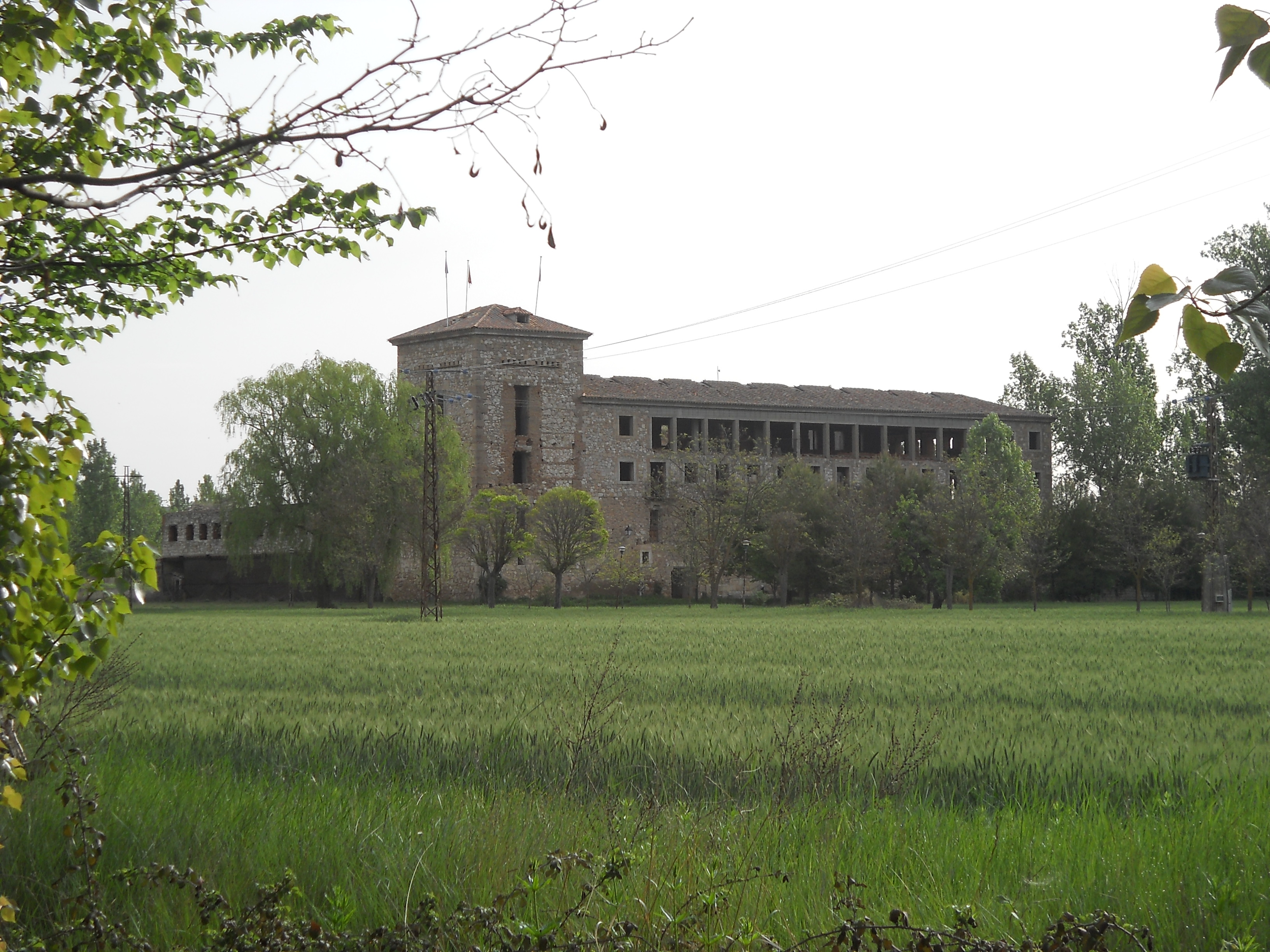 Monasterio de Sopetrán, Hita, Guadalajara, España